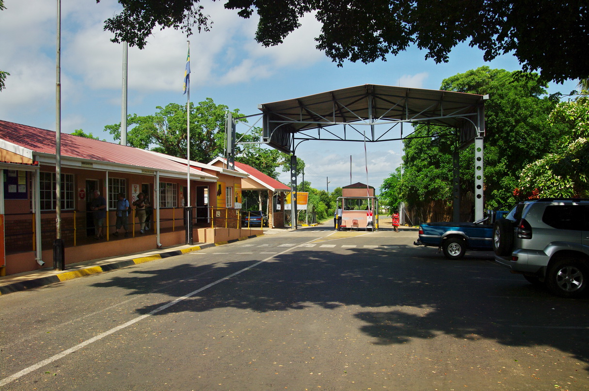 Grenzübergang Jeppes Reef nach Swasiland